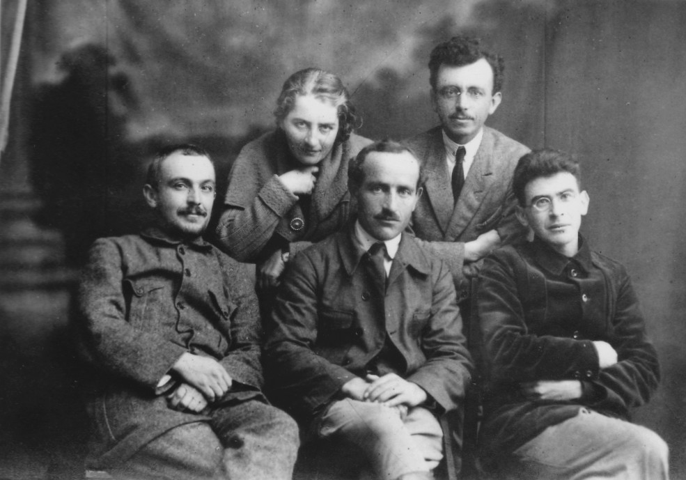 מימין למעלה ובכיוון השעון: דב הוז, דוד סברדלוב, נתן חרובי, דוד רמז, גוסטה שטרומפף.